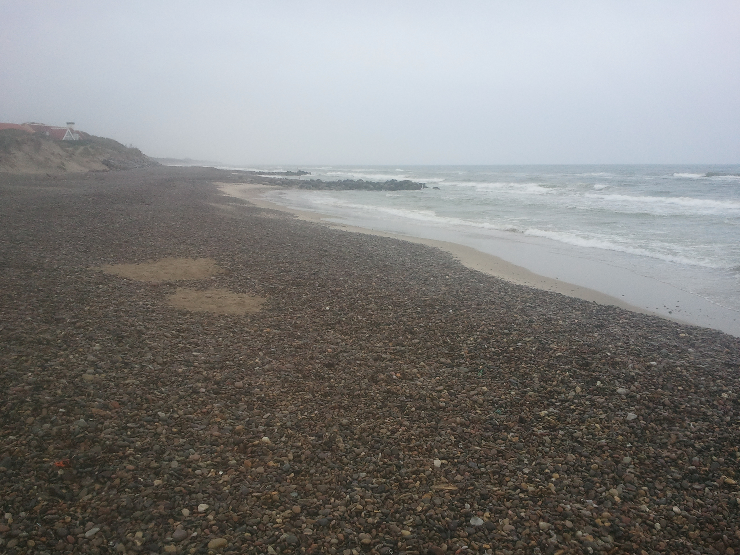 Stranden på vestsiden av Grenen.